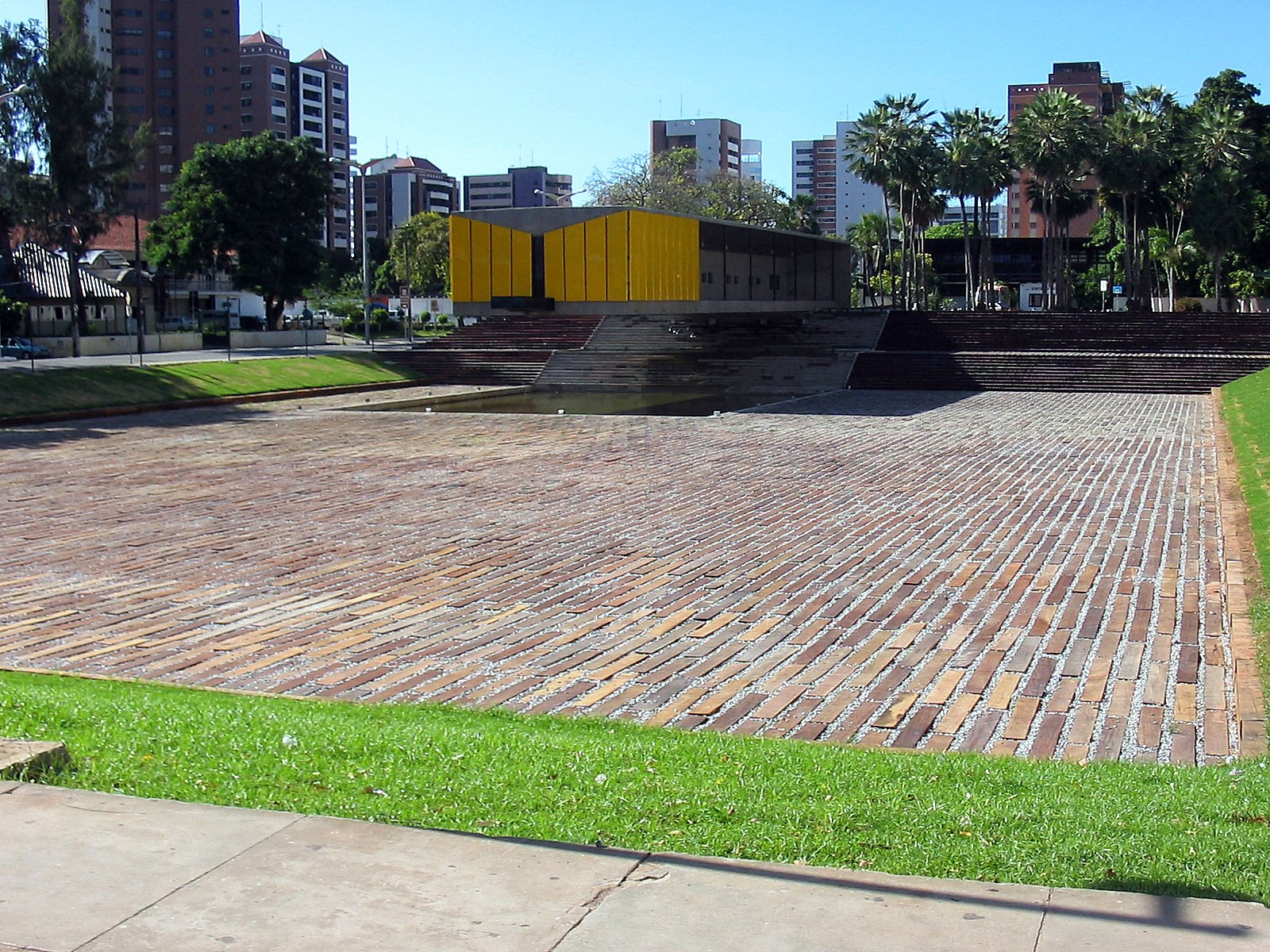 Mausoleo do presidente Castelo Branco na cidade de Fortaleza